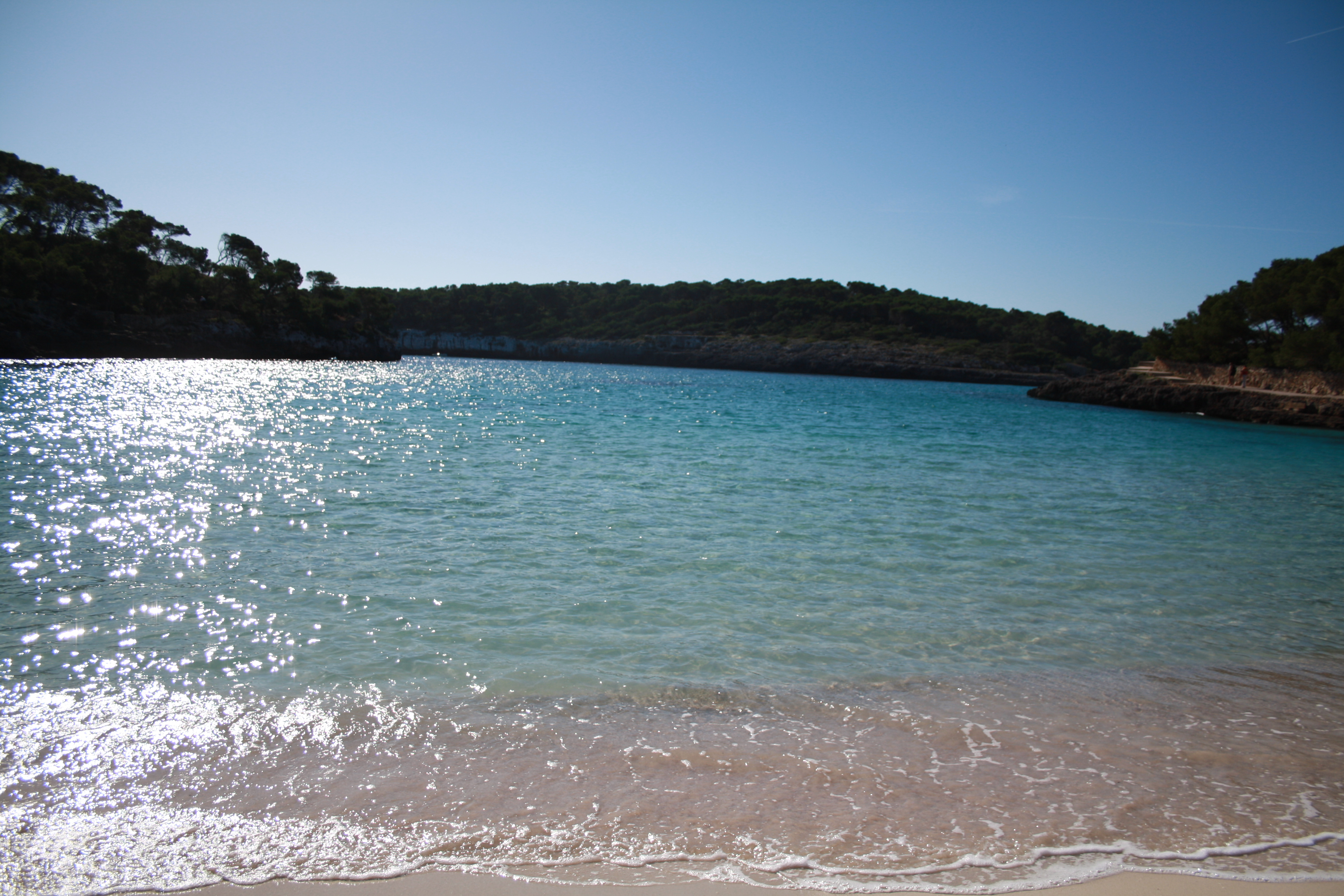 vista de la playa de mondragó en invierno 4